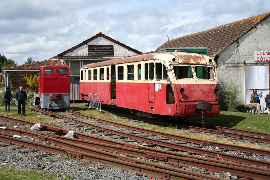 Locotracteur LKM V10C et Autorail De Dion Bouton type OC1 N° 16 de l'ACFCdN